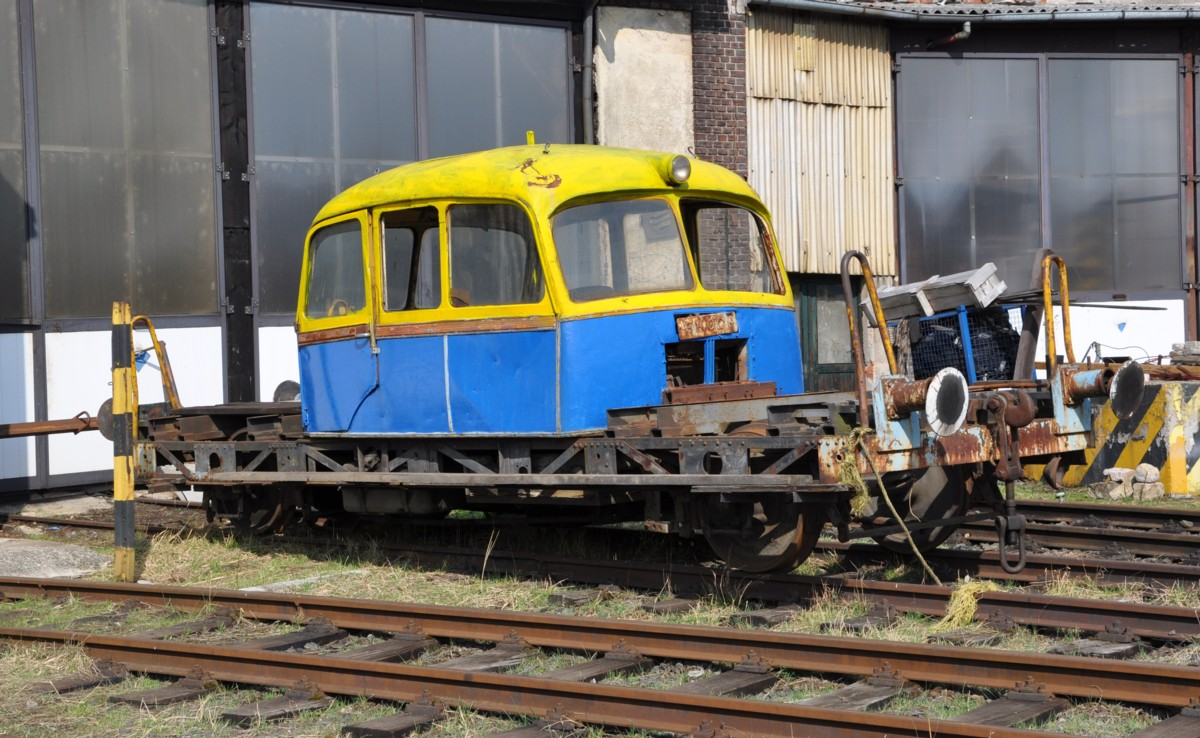 Draisine im Eisenbahnmusum Zdice